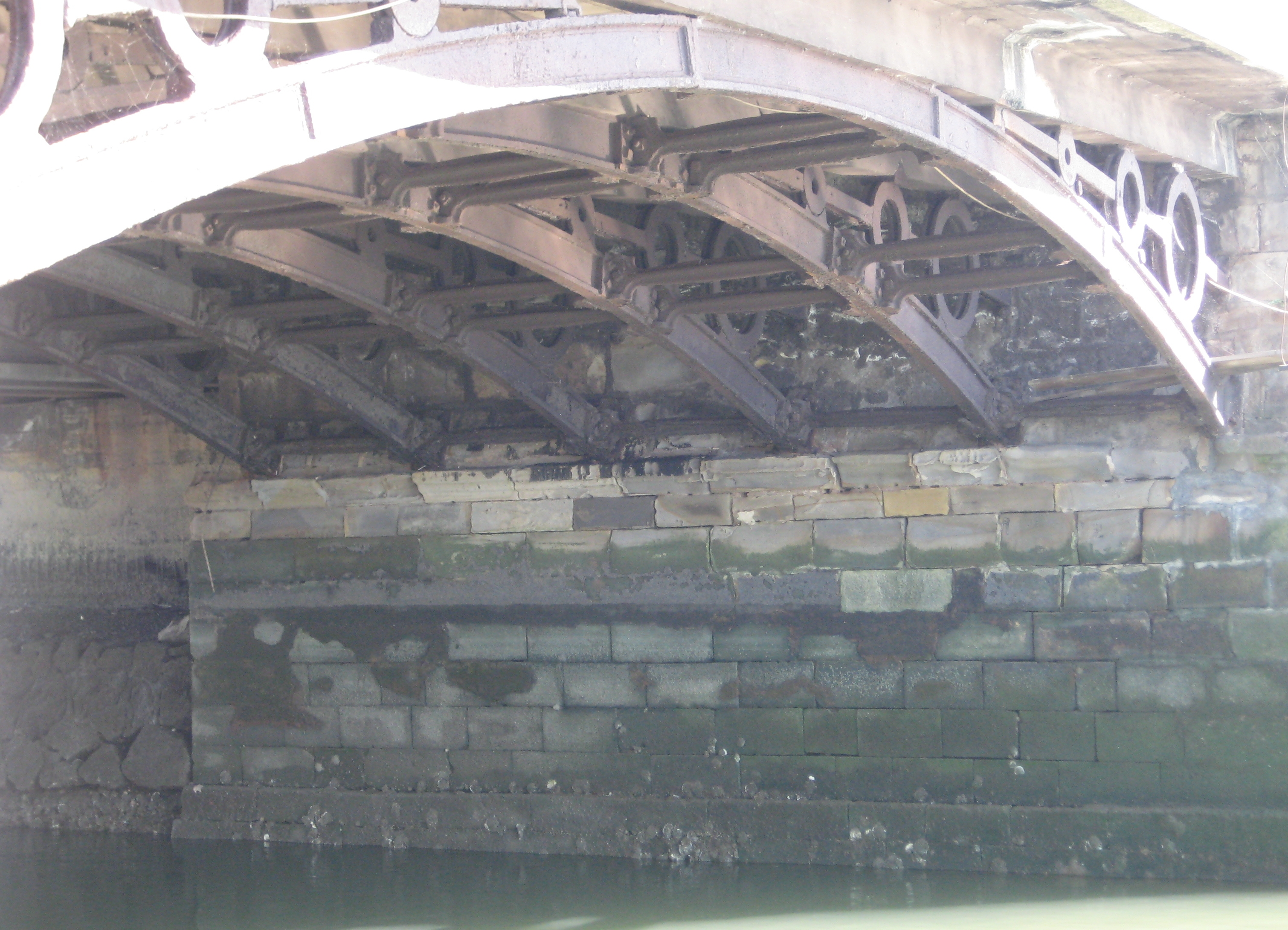 puente